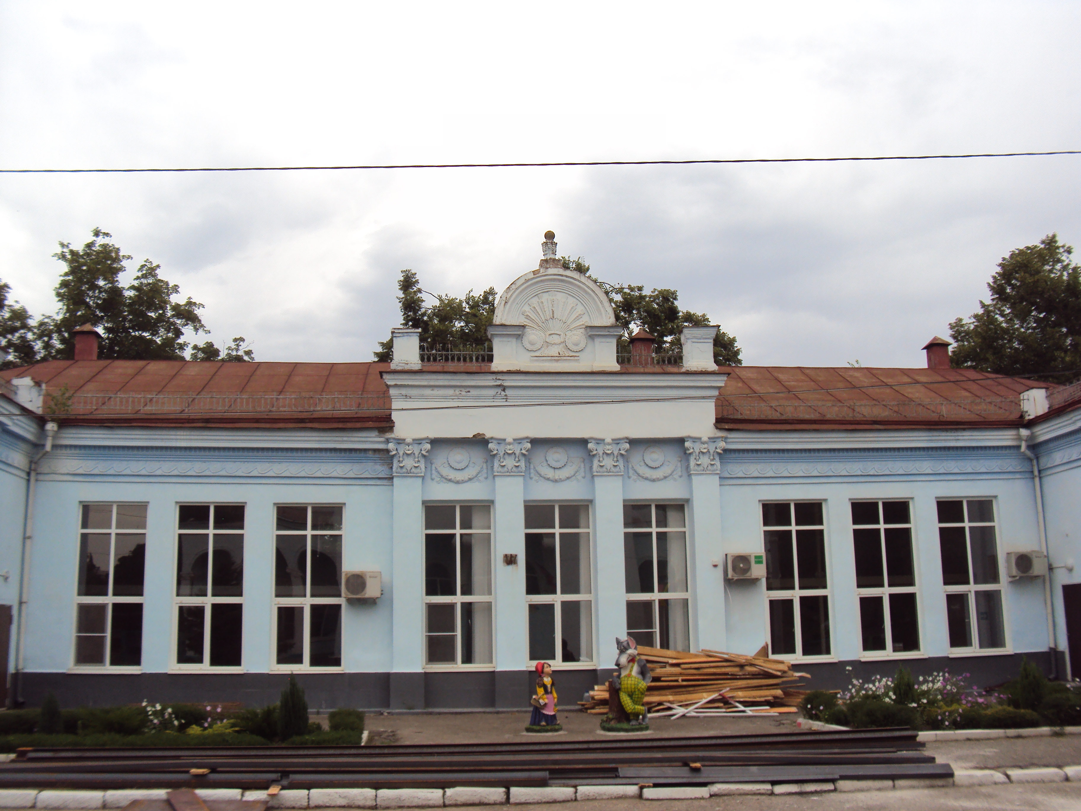 комплекс зданий краевой выставки достижений народного хозяйства. (Краснодарский край, Краснодар, первомайская роща). Ныне детский сад Сказка.